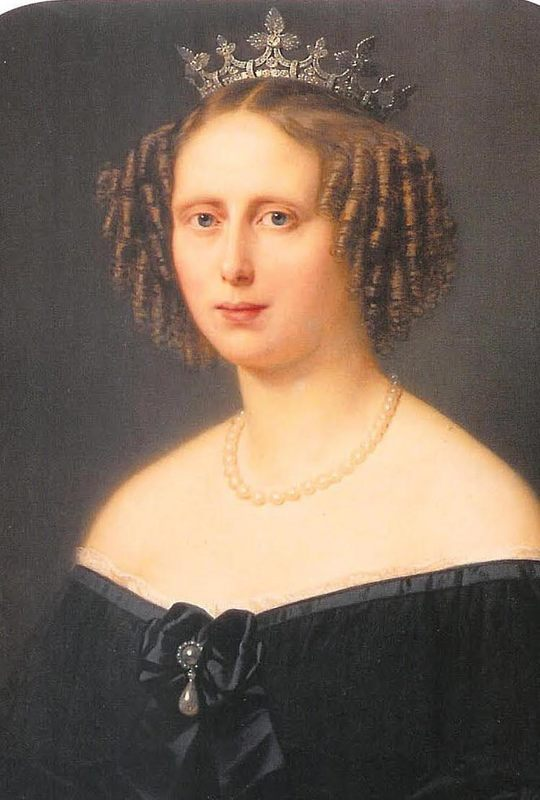 Portret van prinses Sophie van Wurttemberg (overleden 1877); waarschijnlijk gemaakt omstreeks 1840.